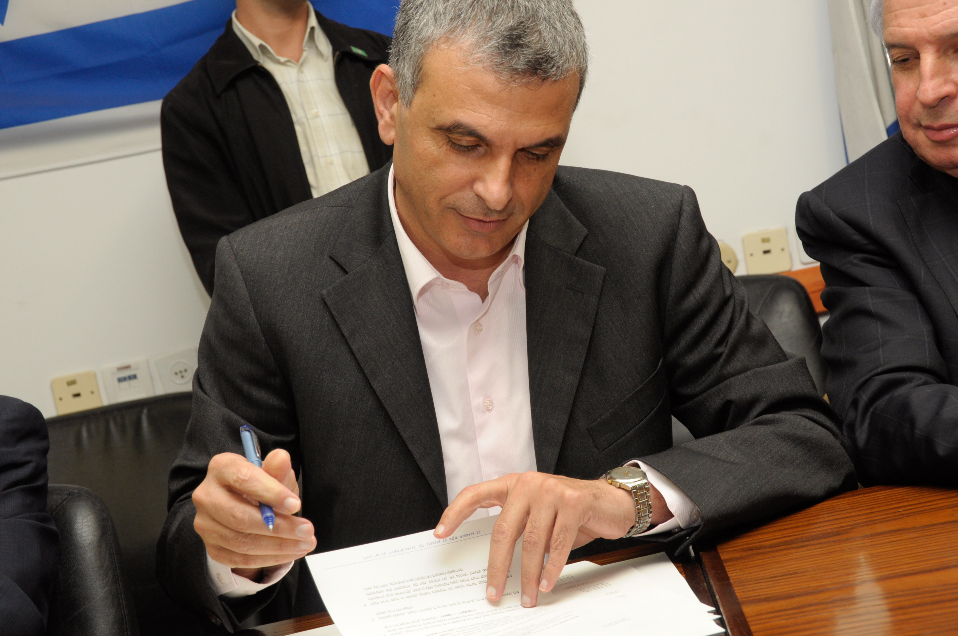 משה כחלון בתפקידו כשר התקשורת, חותם על עסקת בזק אלוביץ'